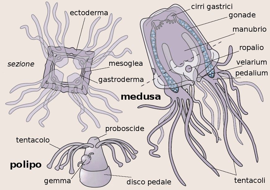 Ciclo di vita di una medusa scatola (Cubozoa)